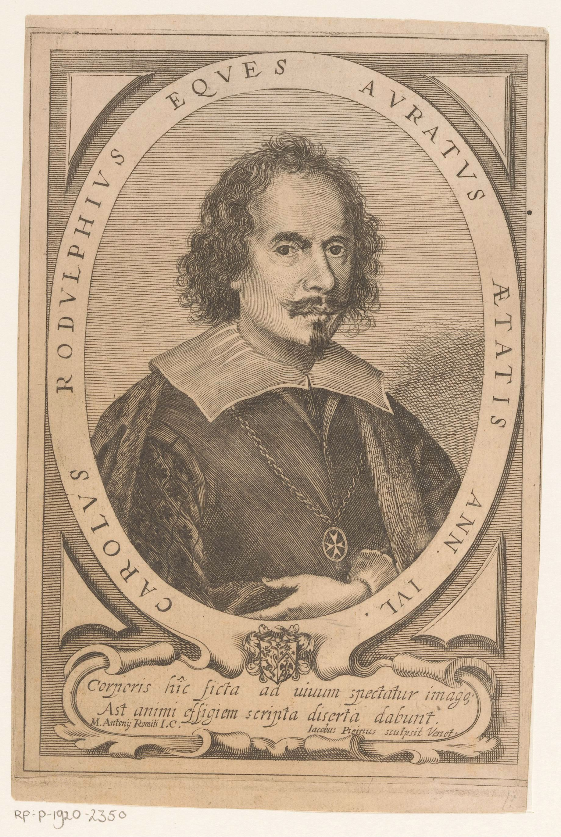 IdentificatieTitel(s): Portret van schilder en schrijver Carlo RidolfiObjecttype: prent boekillustratie Objectnummer: RP-P-1920-2350Opschriften / Merken: verzamelaarsmerk, verso, gestempeld: Lugt 2228VervaardigingVervaardiger: prentmaker: Giacomo Piccini (vermeld op object)naar ontwerp van: Antonio Romilo (vermeld op object)uitgever: Giovanni Battista SgavaPlaats vervaardiging: prentmaker: Venetiënaar ontwerp van: Italiëuitgever: VenetiëDatering: 1648Fysieke kenmerken: gravureMateriaal: papier Techniek: graveren (drukprocedé)Afmetingen: blad: h 208 mm (Binnen plaatrand afgesneden.) × b 138 mm (Binnen plaatrand afgesneden.)ToelichtingPrent gebruikt voor de publicatie: Ridolfi, Carlo. Le Maraviglie dell'Arte. Venetië: Giovanni Battista Sgava, 1648.OnderwerpWat: historical personsportrait, self-portrait of artistportrait of a writerWie: Carlo RidolfiVerwerving en rechtenVerwerving: aankoop 1905Copyright: Publiek domein